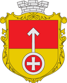 Герб села Нова Вижва